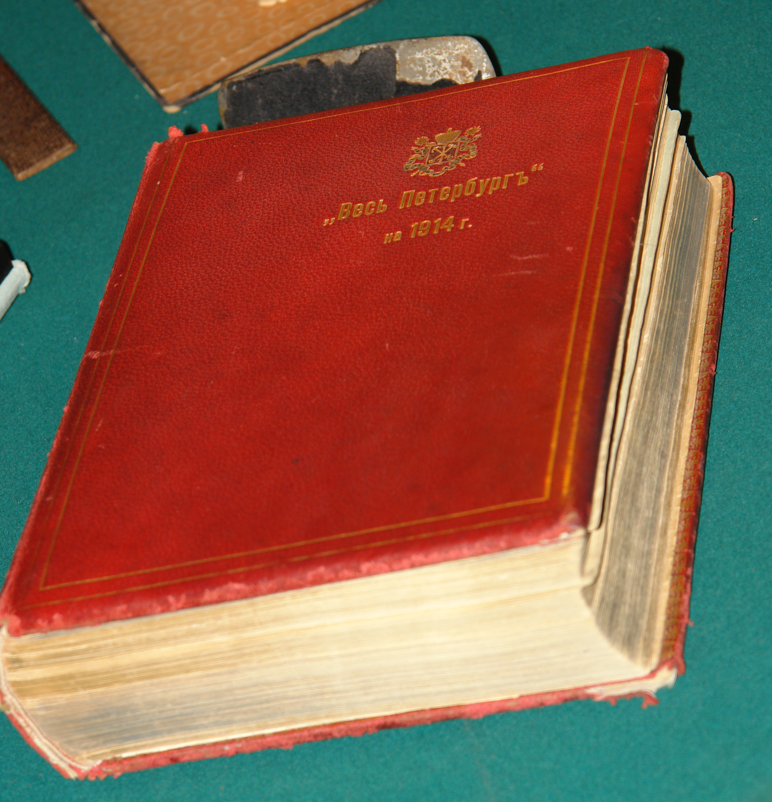 Справочник "Весь Петербург" за 1914 год. Музей Печати, Санкт-Петербург